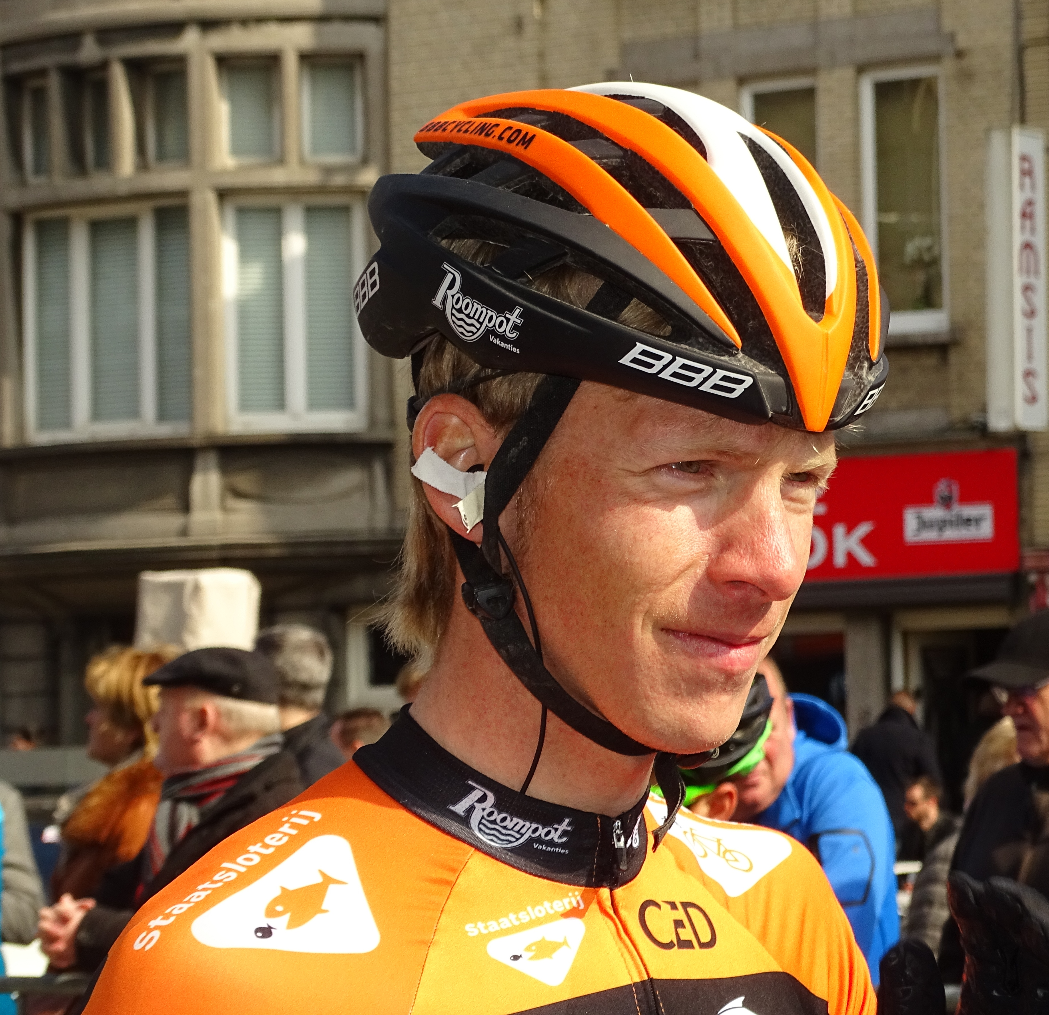 Reportage réalisé le mercredi 16 mars à l'occasion du départ de la Nokere Koerse 2016 à Deinze, Belgique.